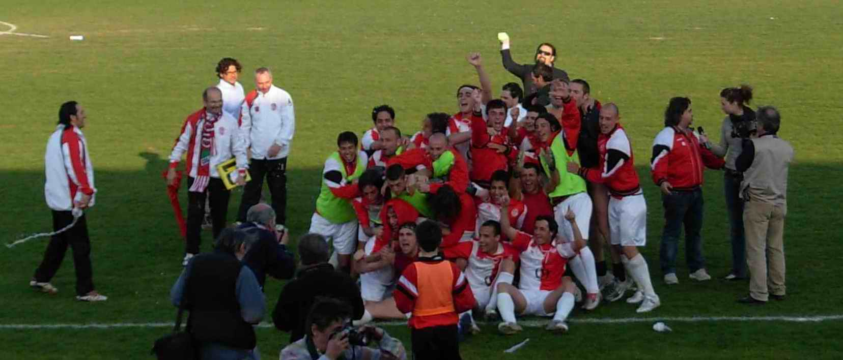 Colle di Val d'Elsa - Colligiana 2006/2007 - si festeggia la promozione in serie D